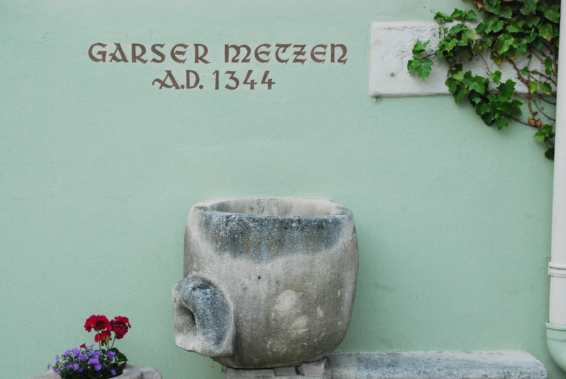 Der Garser Metzen am Rathaus von Gars am Kamp in Niederösterreich